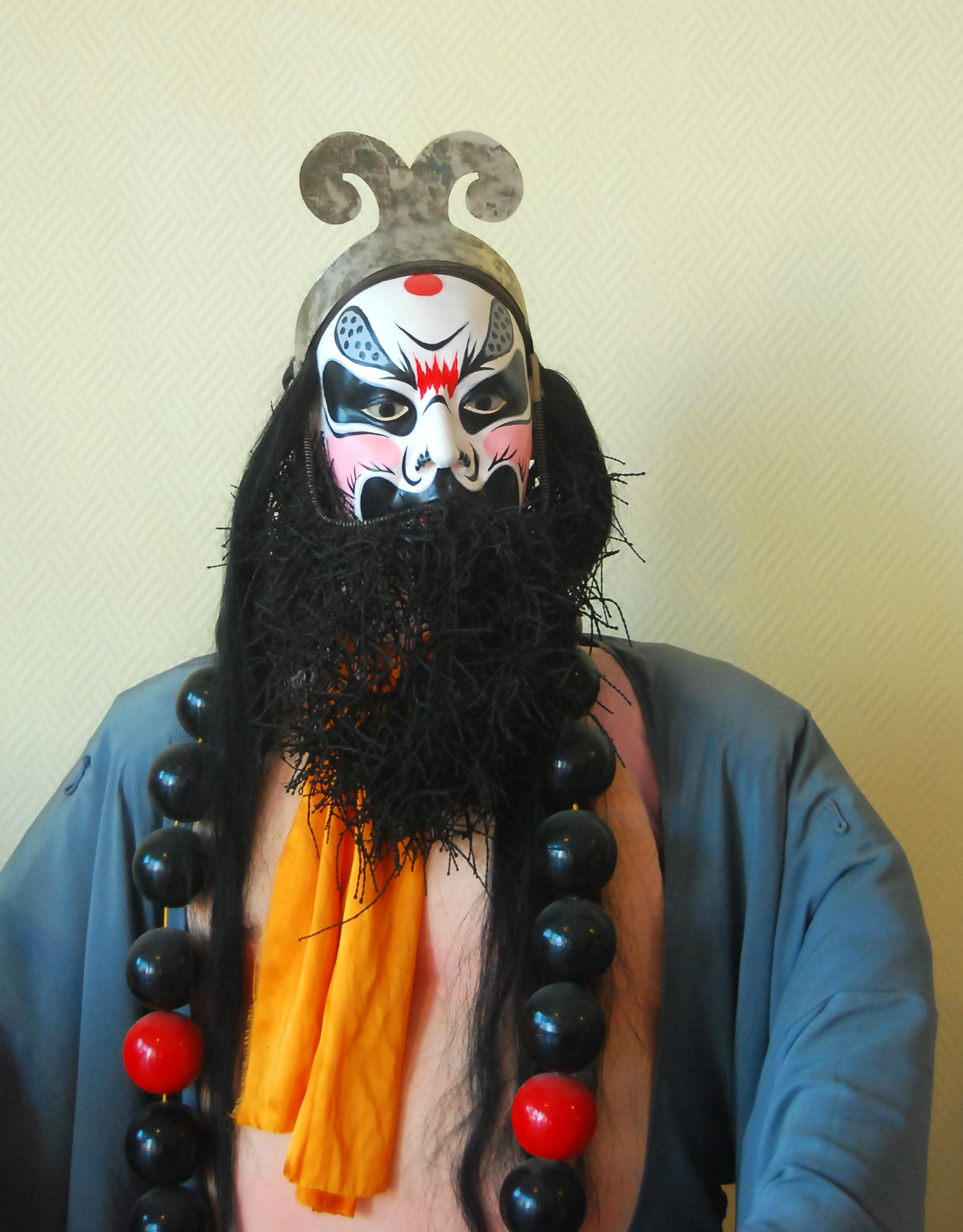 沙僧在京剧中的扮相